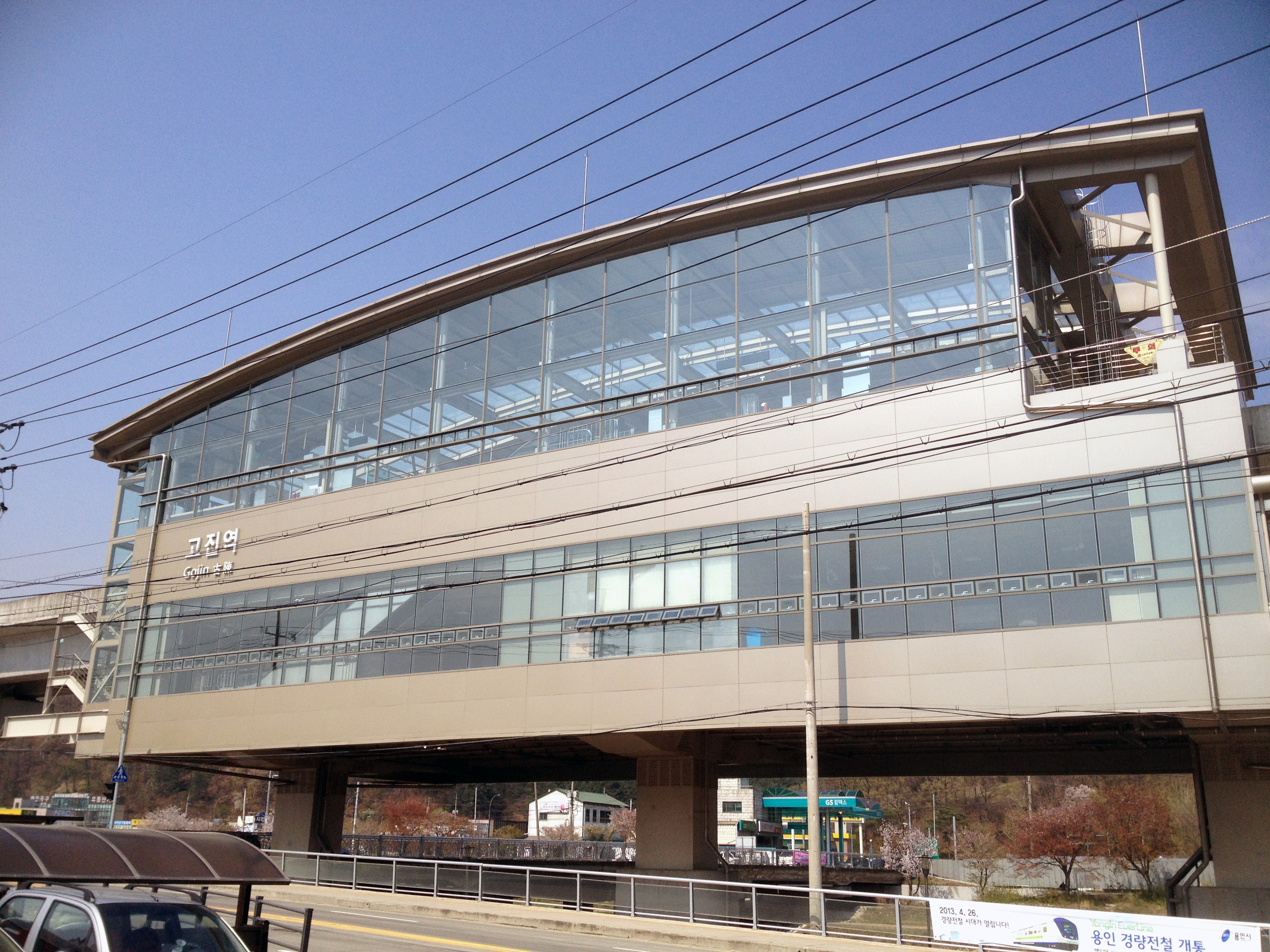 고진역 역사